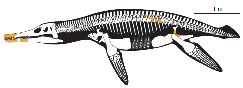 Reconstruction of Makhaira rossica based on Late Jurassic pliosaurids and mid-Cretaceos brachauchenines; the orange coloured parts indicate fossils preserved in YKM 68249/1-10.